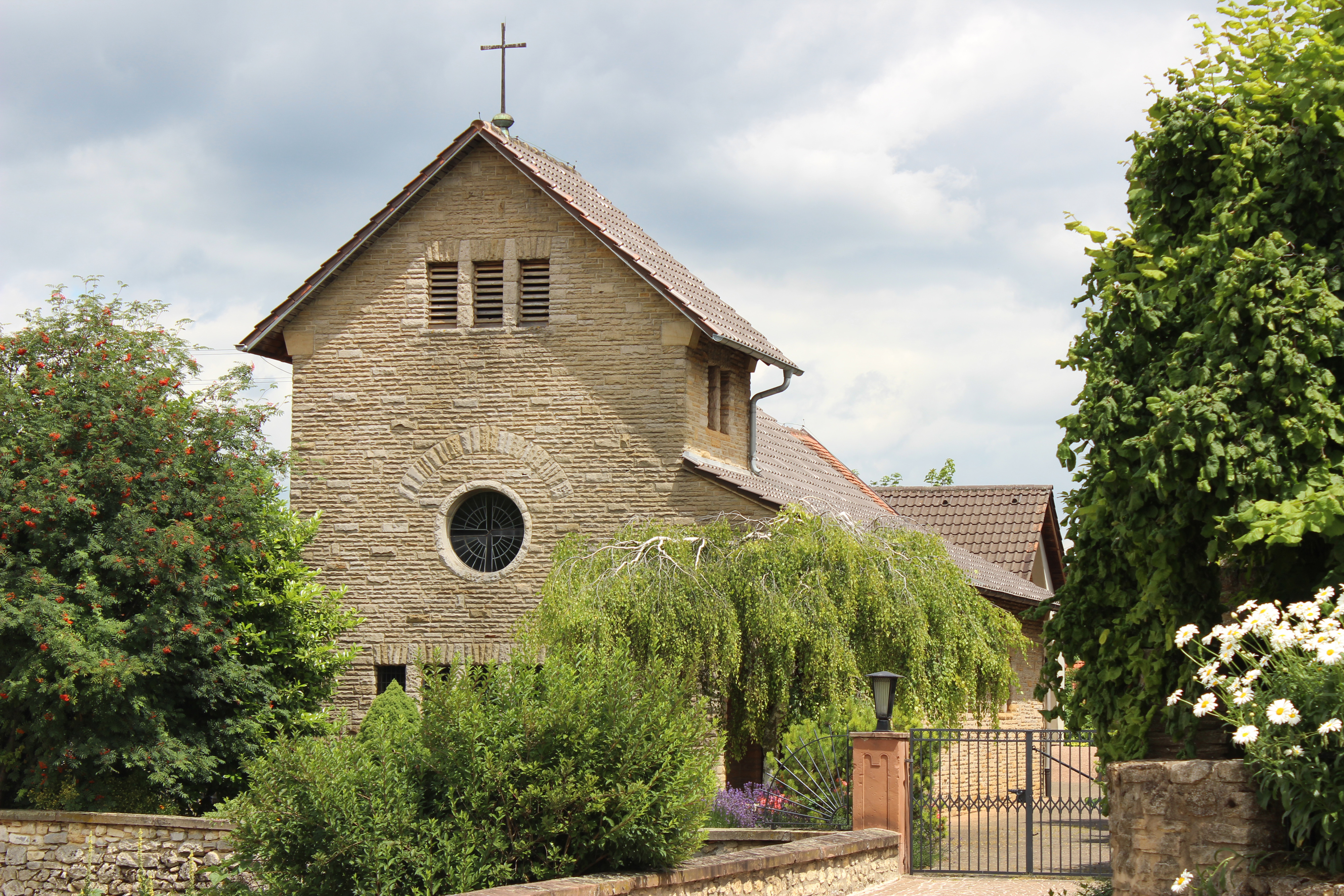 1963/64 auf den Fundamenten des gotischen Vorgängers erbaute Kirche. Chor der ursprünglichen Kapelle erhalten und integriert. Lavabonische, Sakramentshaus, sowie gotische Fresken erhalten.